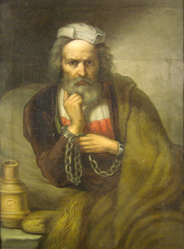 Jakobey Károly (1825–1891): Táncsics Mihály a börtönben (1848)